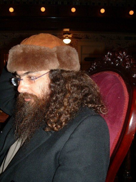 אוהד אזרחי, בכנס רבני היהדות המתחדשת בבולדר קולורדו